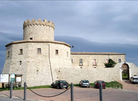 Palmoli - il Torrione, simbolo del paese